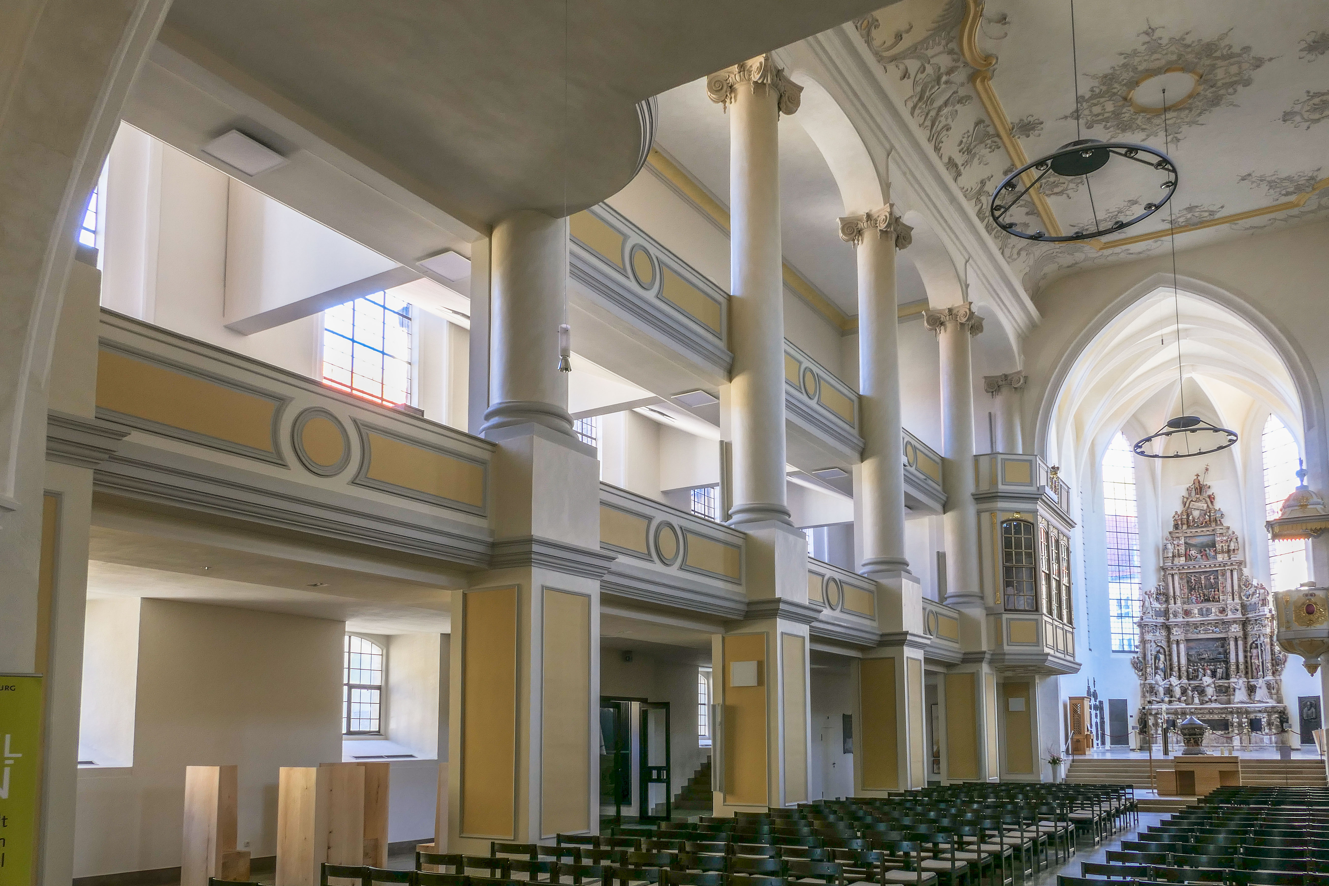 Innenraum der Morizkirche